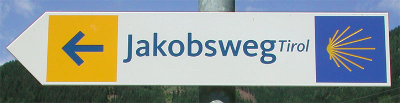 Hinweistafel des Jakobsweg Tirol bei Silian in Osttirol